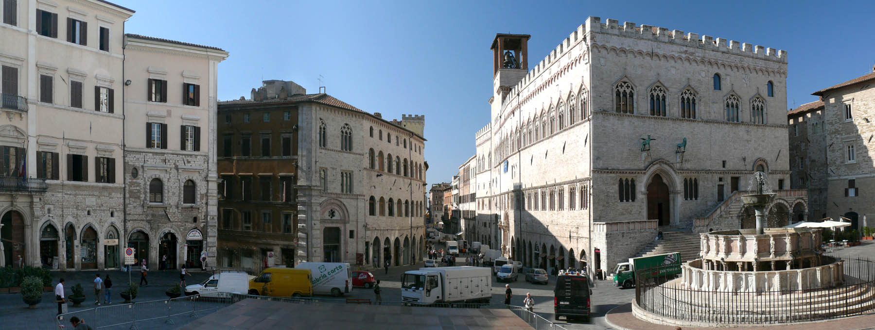 Perugia, Piazza IV Novembre